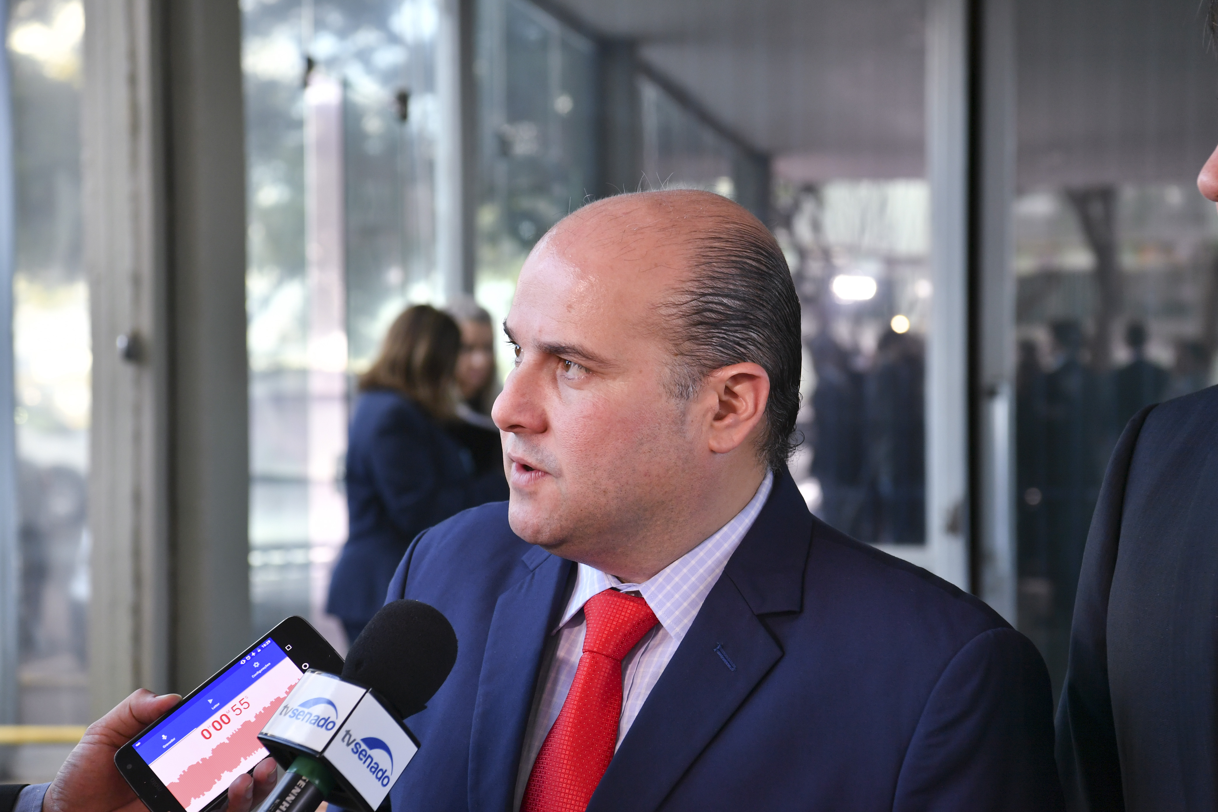 Prefeito de Fortaleza, Roberto Claudio concede entrevista. Foto: Marcos Brandão/Senado Federal